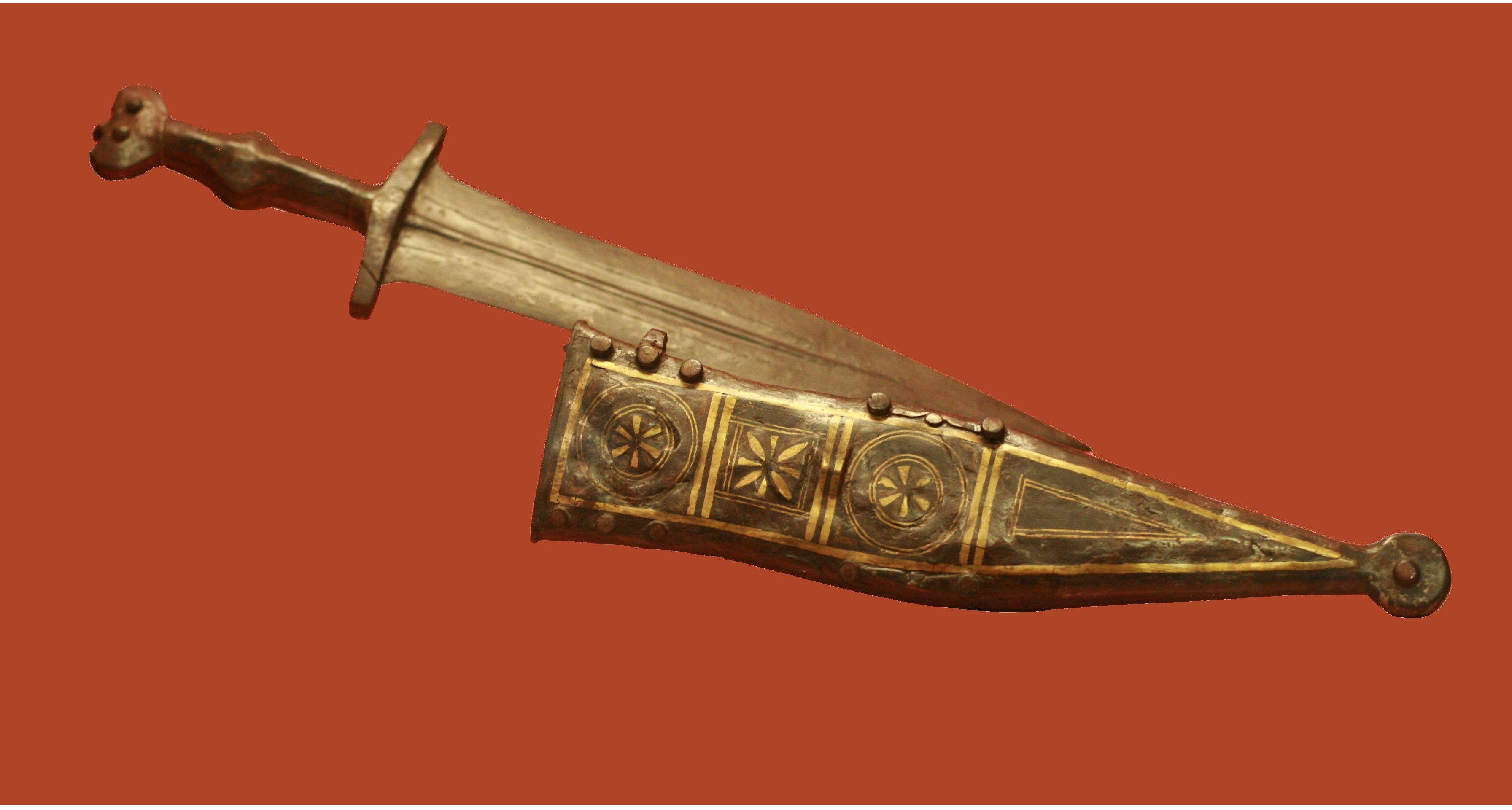 Römischer Pugio (Dolch) mit Scheide aus dem 2. Jh., Museum Carnuntum